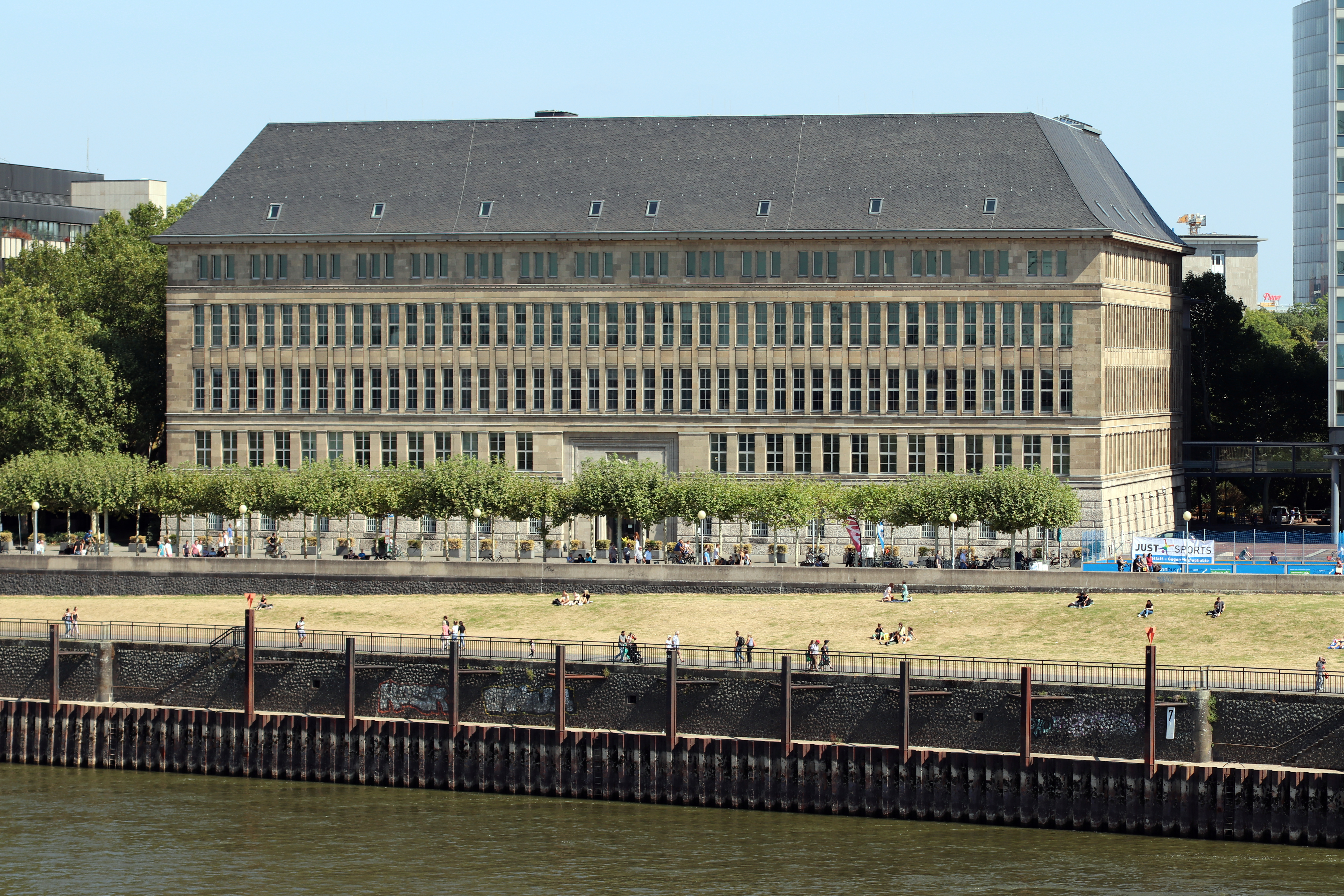 Düsseldorf Rheinuferpromenade, aufgenommen von der Rheinkniebrücke